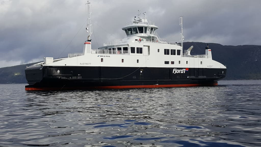 Bilde av bilfergen Vestrått